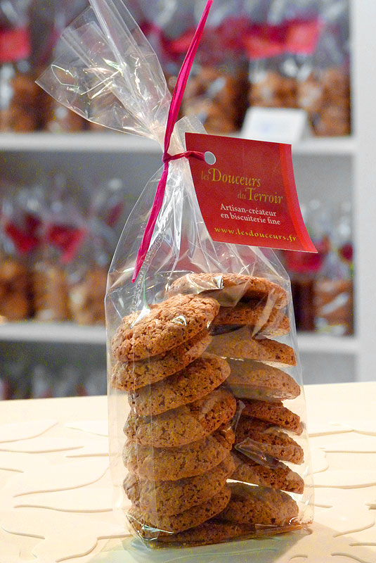 Véritables Macarons de Fontevraud, macarons à base d'amandes et noisettes, fabrication artisanale à la main.